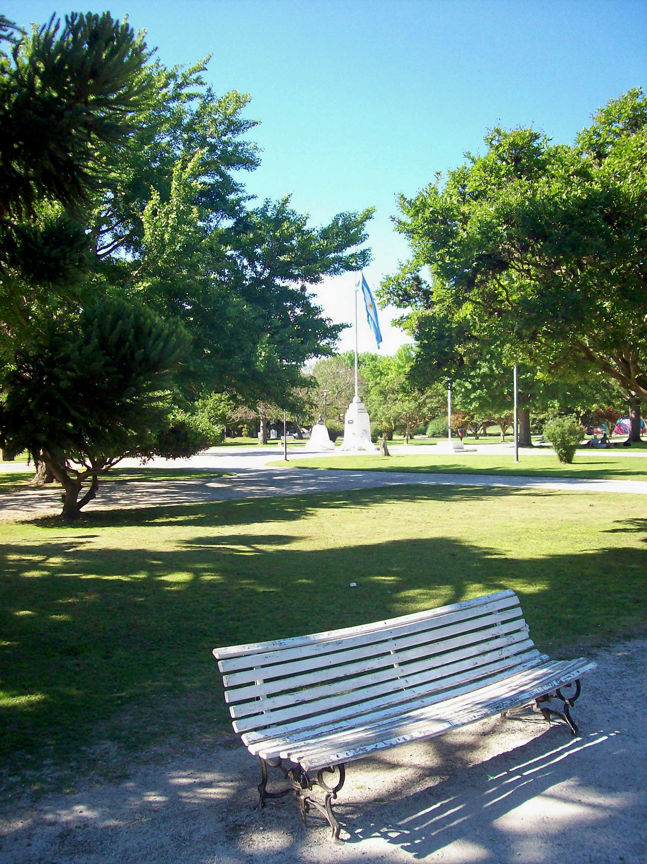 Plaza principal de Verónica, pueblo de la provincia de Buenos Aires, Argentina, cerca de La Plata.